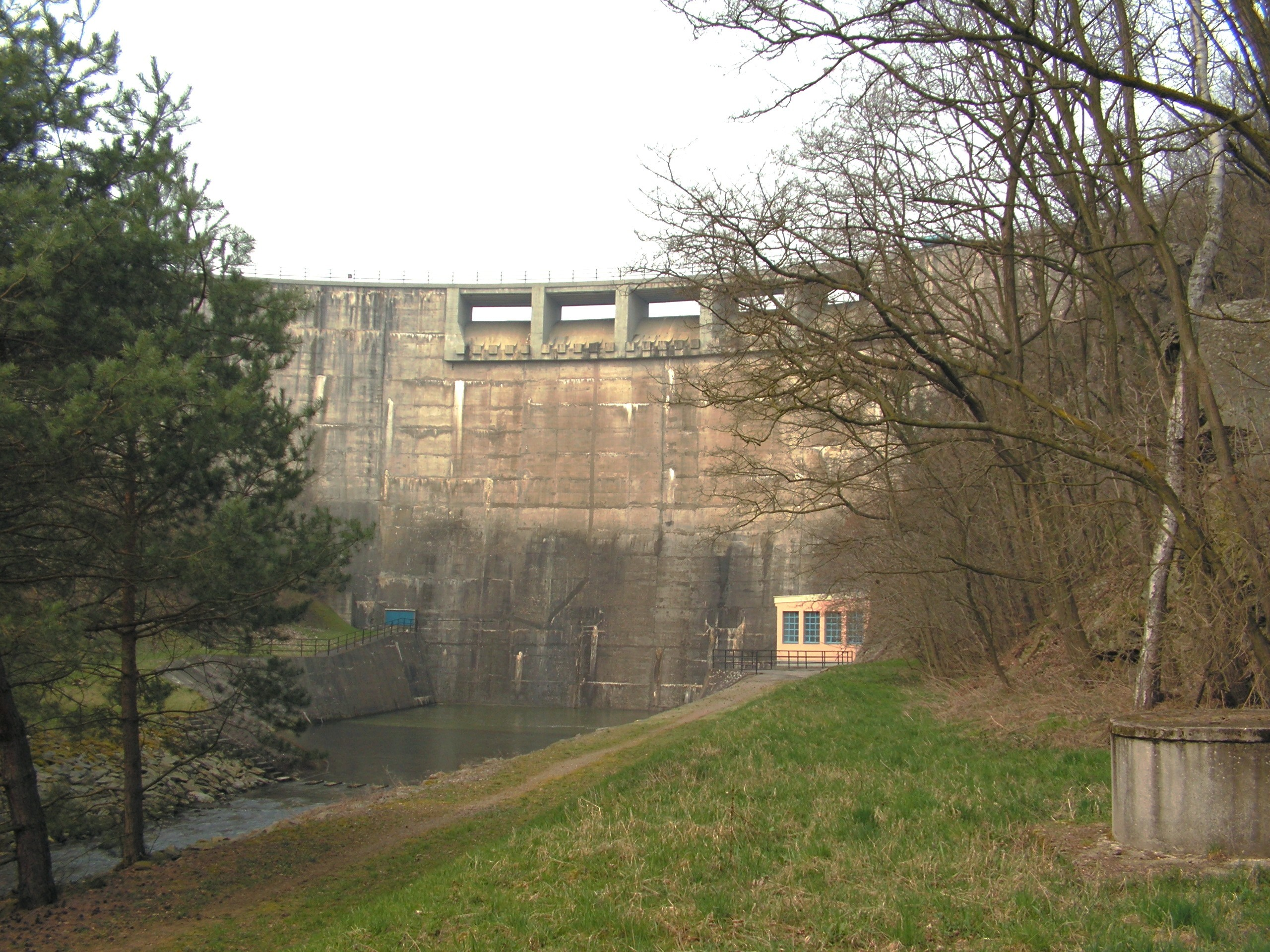 Klenbová hráz VD Vrchlice.